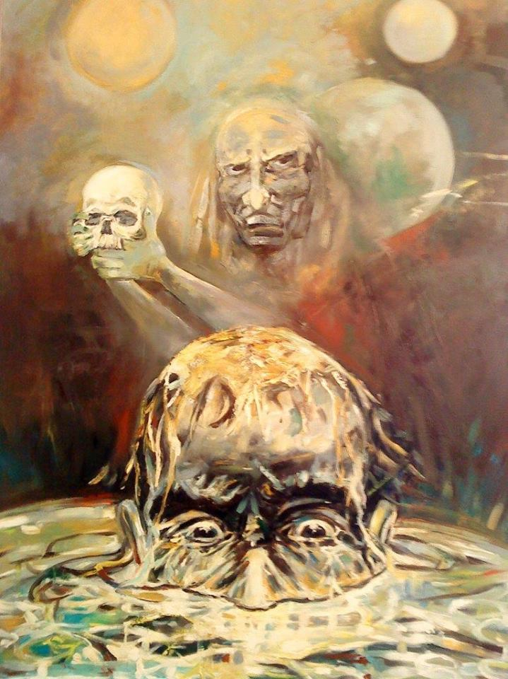 Ziemia bez lądu ‘’- rok 1998 - 105x70 - olej na płótnie, fotografia Marek Kubski